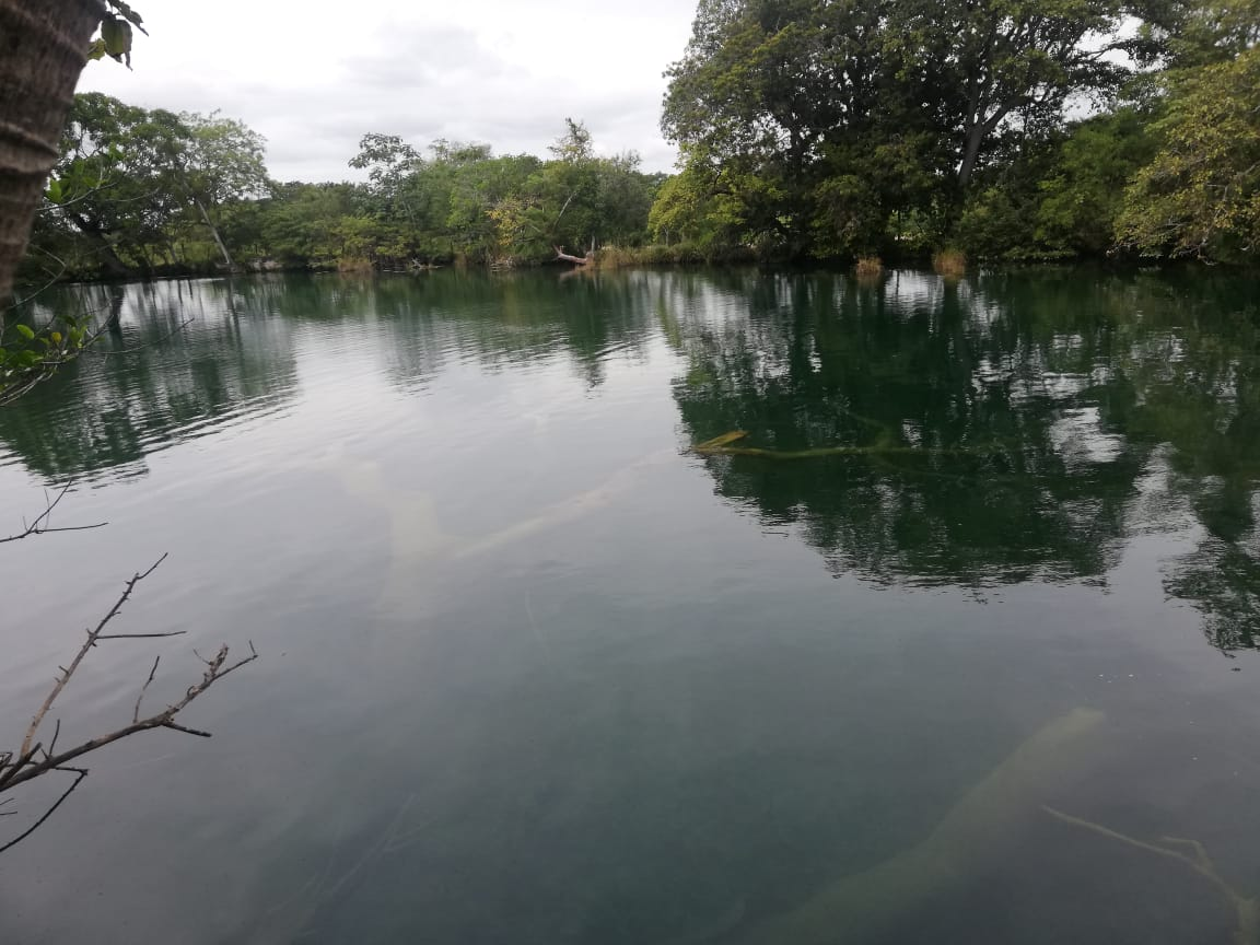 A tan solo 15 MInutos con frontera Guatemala se encuentra bellos lagos de colon